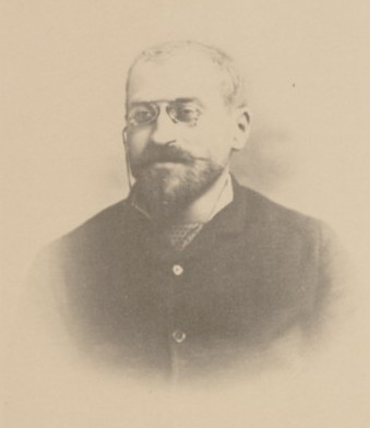 Clément Lippacher